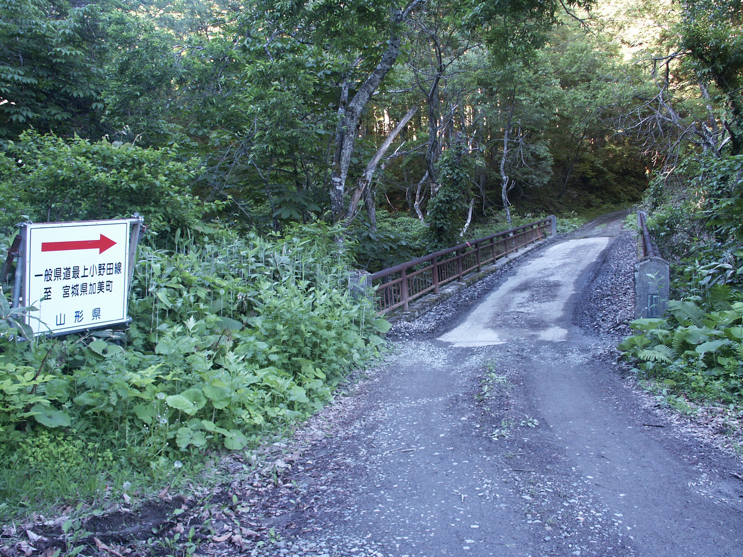 山形県道262号線最上町朝日沢付近